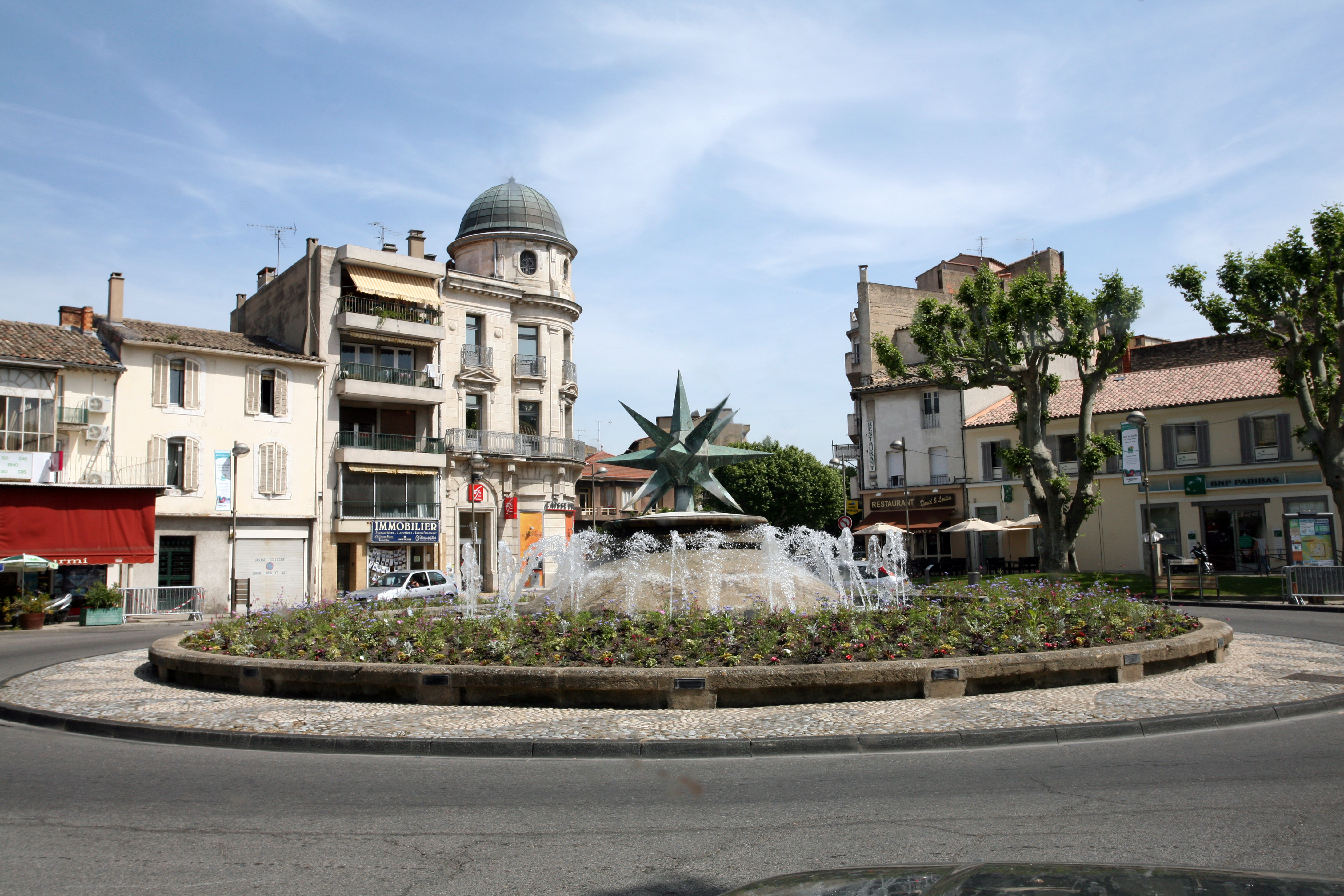 Rond point du polyèdre de Pythagore (ou de l'étoile), Cavaillon, Vaucluse